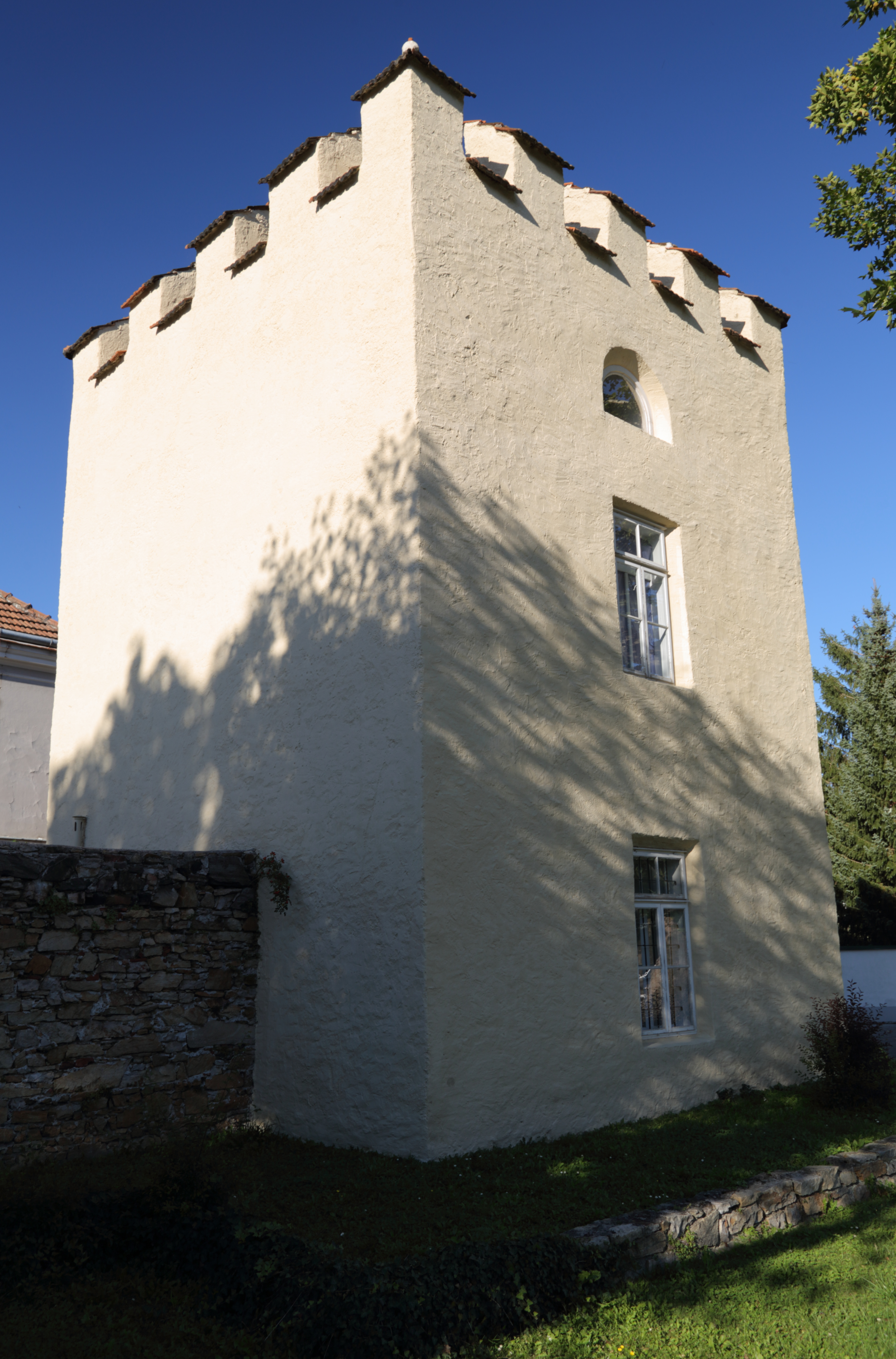 Burgerturm und Stadtmauerrest